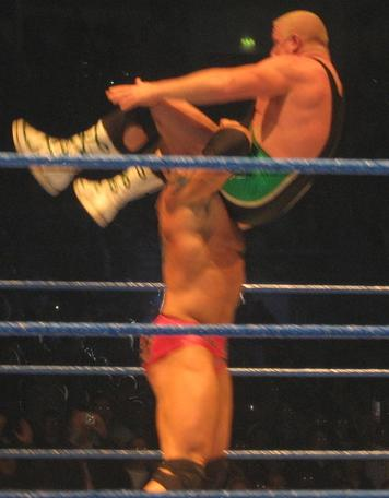 El Batista Bomb, tomada en un house show